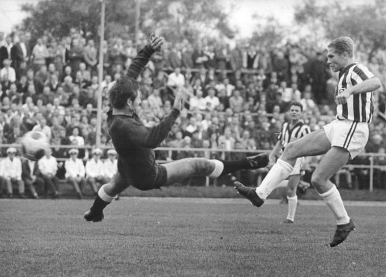 Zentralbild-Studré Stu-Qu 18.9.1965 Berlin: SC Dynamo Berlin gegen SC Leipzig 5:3 - Vergeblich versucht Torwart Neuhaus (SC Leipzig, links) den Schuss von Kochale (SC Dynamo) abzuwehren, der die Dynamo-Elf mit 2:0-Toren in Führung brachte. Information: Am 18.9.1965 fand im Berliner Dynamo-Sportforum die Fußball-Oberliga-Begegnung zwischen dem SC Dynamo Berlin und dem SC Leipzig statt.